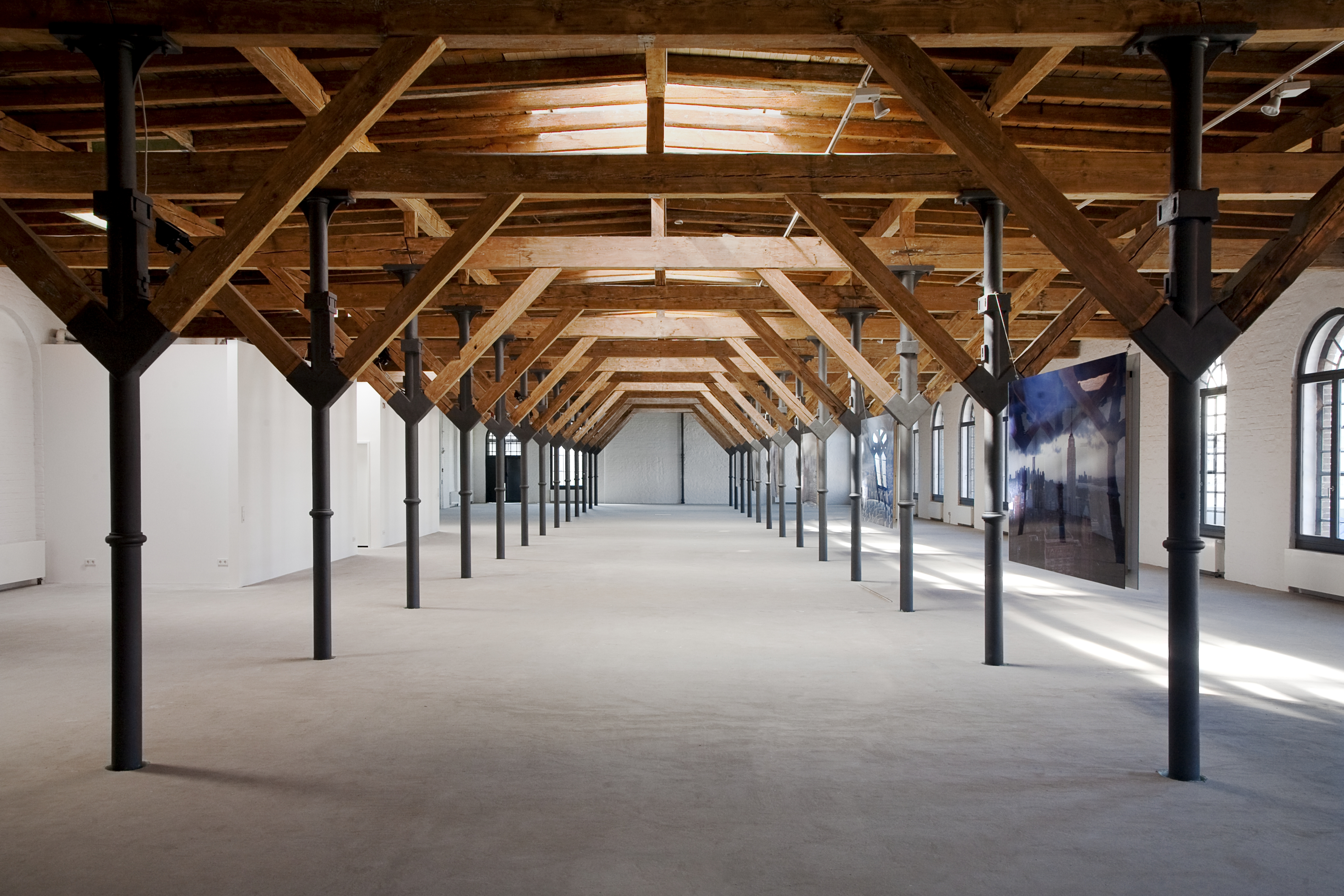 Innenansicht 1.OG Werkstatt (nach dem Umbau)